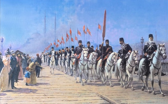 Ertugrul Cavalry Regimentlabel QS:Len,"Ertugrul Cavalry Regiment" label QS:Ltr,"Ertuğrul Süvari Alay"